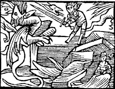 Hie kumpt Seyfrid auff den Trachen stayn vnd ficht mit dem Trachen, so fliegen die andern Trachen all daruon.